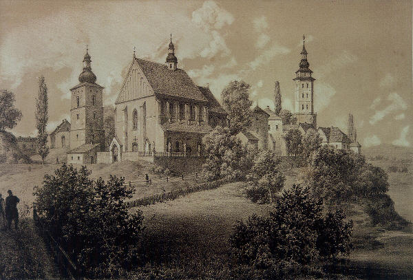 Rycina 154 z Serii VI z "Albumu widoków przedstawiających historyczne miejsca...", Pińsk 1875-1883.Podpis oryginalny:BIECZ NAD RZEKĄ ROPĄ (Galicya) W r. 1125. Biecz i okolice spustoszone zostały przez Wołodara Ks. Przemyślskiego. Miasto oddane jest kapitule Krakowskiej roku 1294. W roku 1311, przyłączone do dóbr królewskich. W 1400 r. powtórzone tu zostały przez poselstwa układy małżeństwa króla Jagiełły z Anną hr. Cylejską. Okrągła baszta widoczna na rysunku należała do domu, gdzie się urodził Marcin Kromer sekretarz trzech królów i dziejopis w r. 1512."